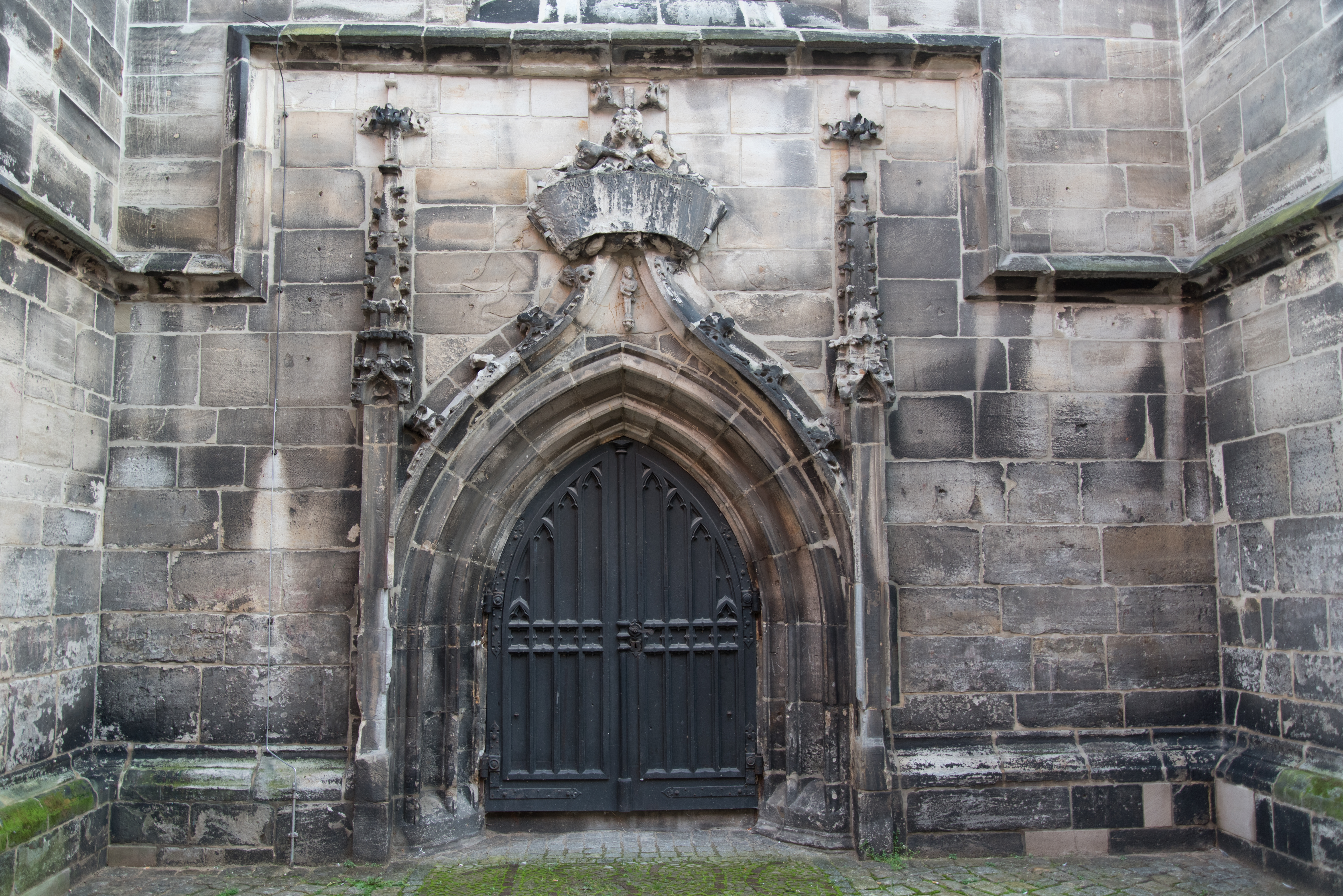 Weißenfels, Marienkirche